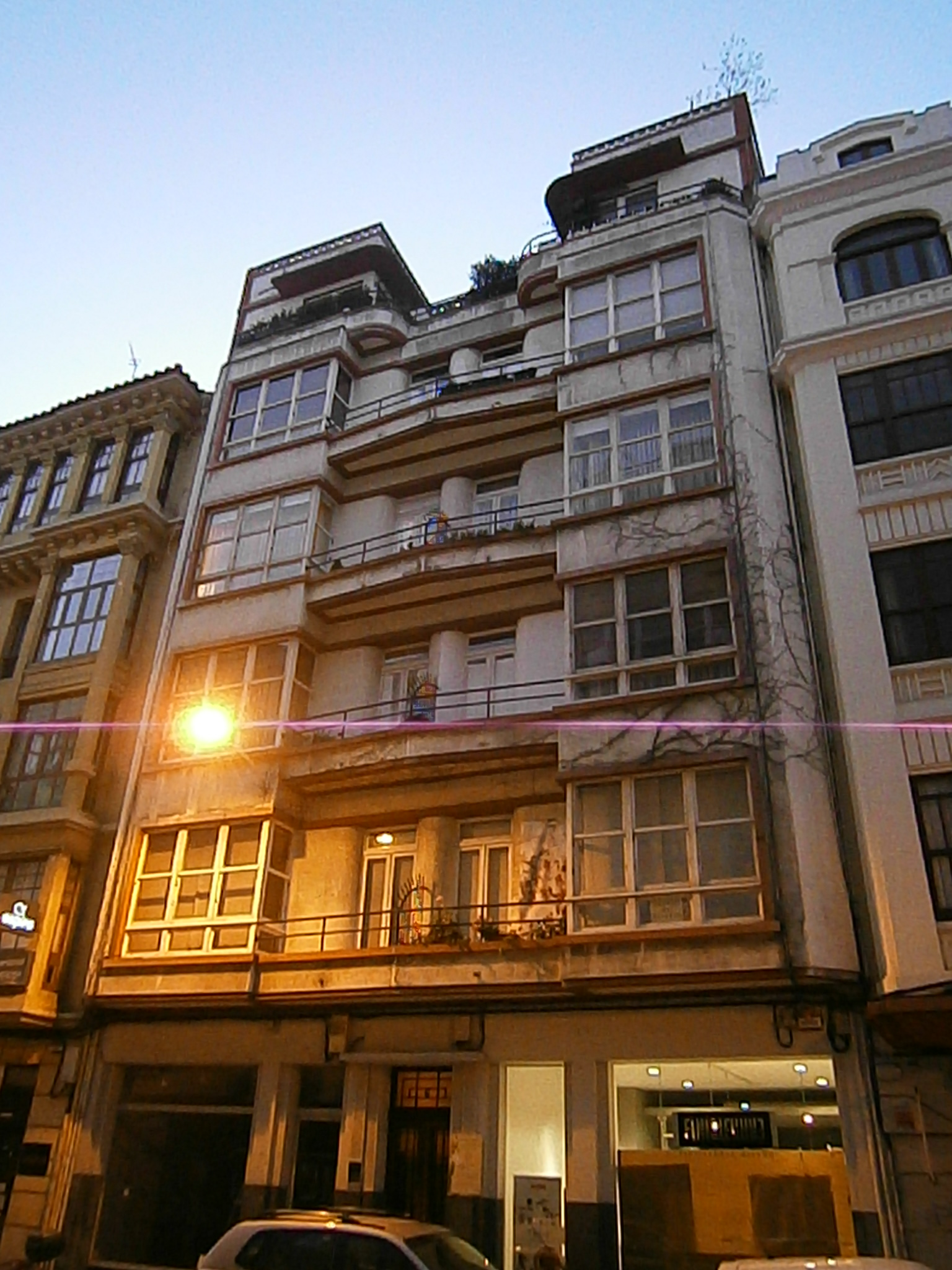 Casa Morán (Rúa de Emilia Pardo Bazán 8, A Coruña), de José Caridad Mateo